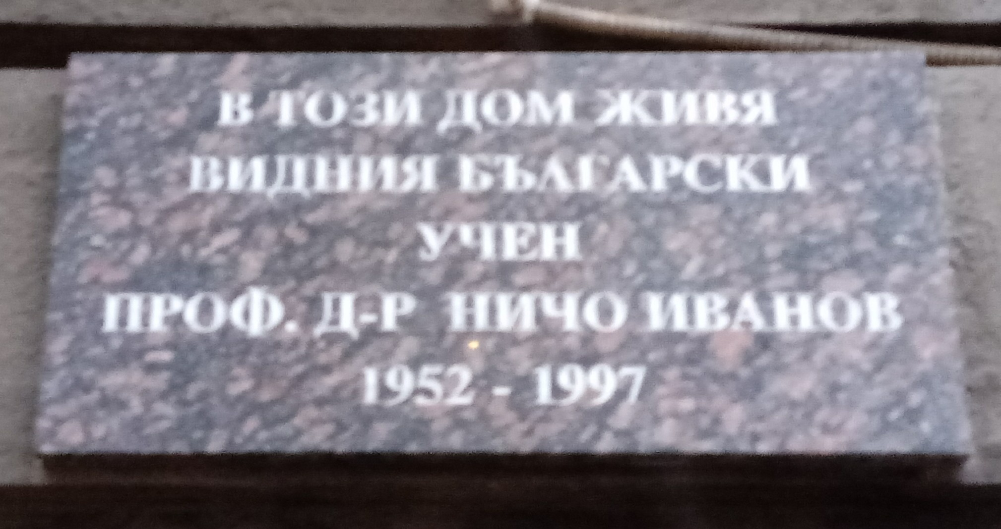 Nicho Ivanov memorial plaque, Lyuben Karavelov Str., Sofia